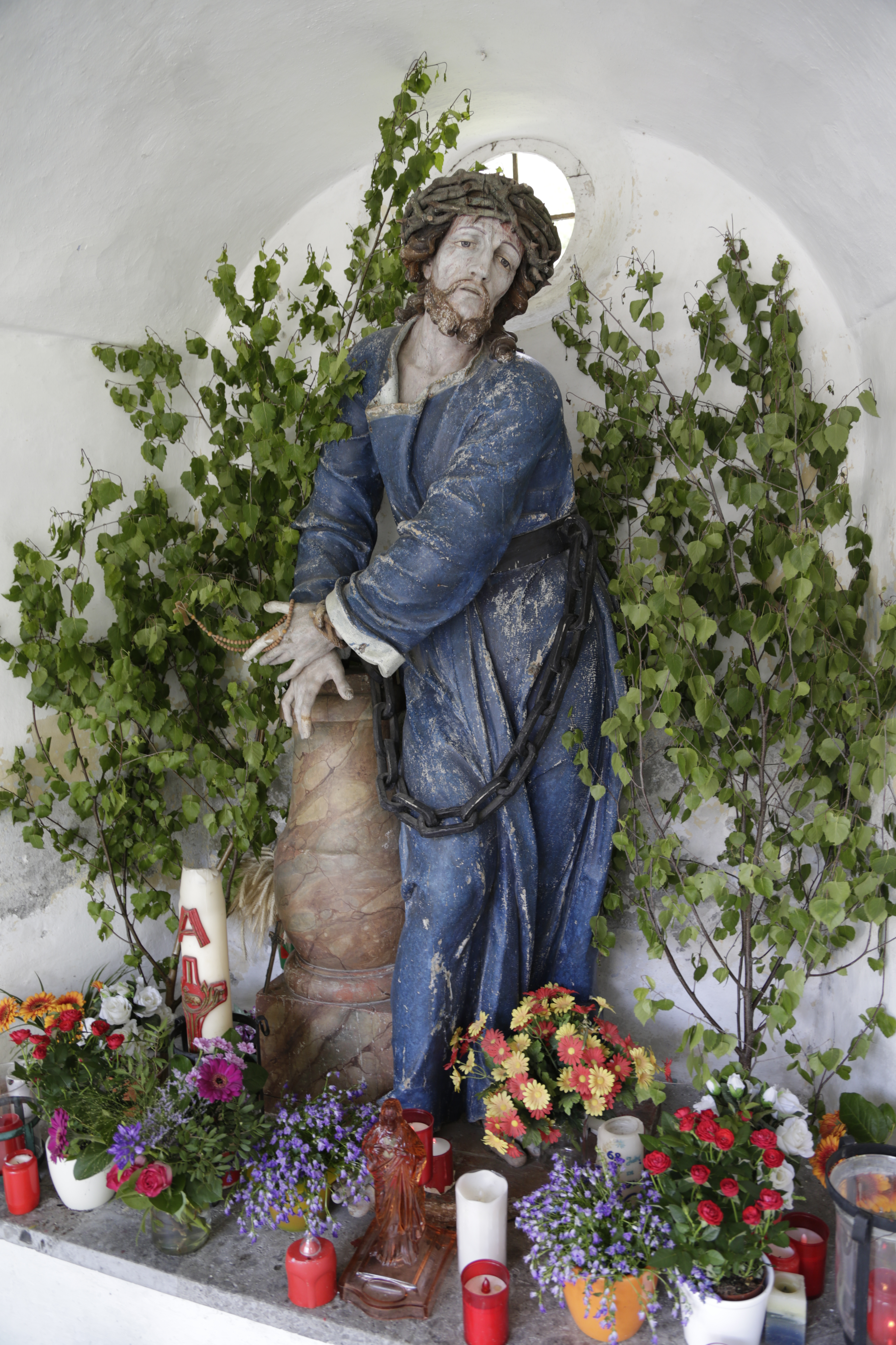 Die Schulerkapelle in Ried im Oberinntal ist denkmalgeschützt. Die Figur des Heiland an der Geisselsäule stammt von Andreas Kölle.